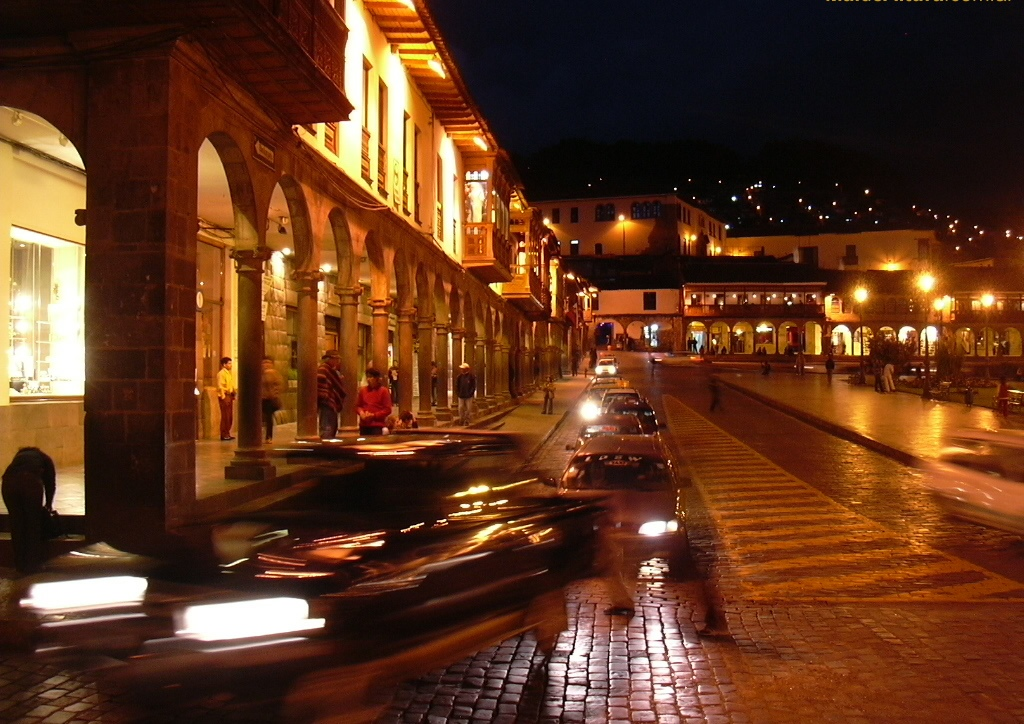 Imagen de la ciudad de Cusco en la noche. Plaza de Armas